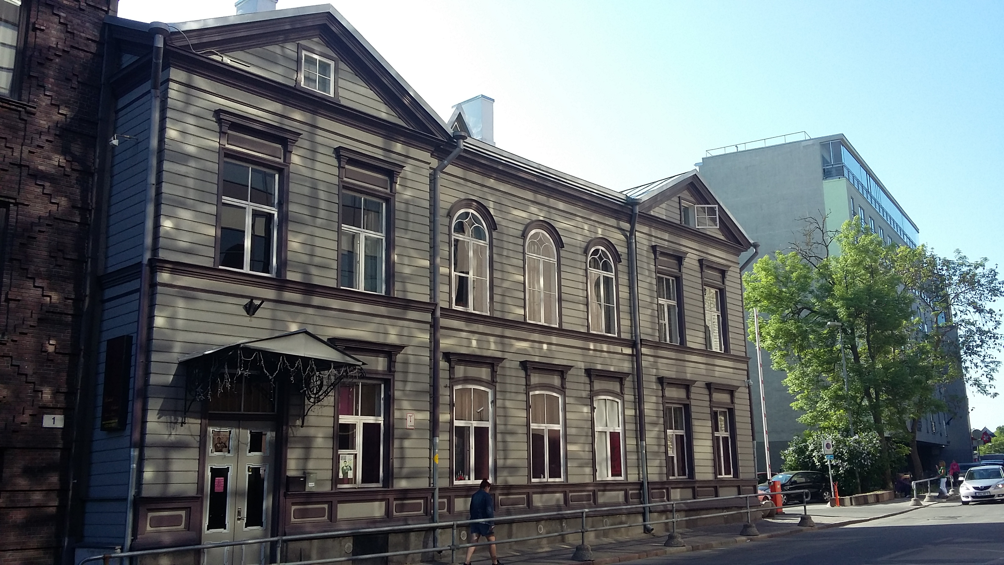 Roosikrantsi 3